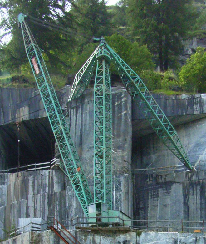 Derrickkran in einem Steinbruch der Region Aosta